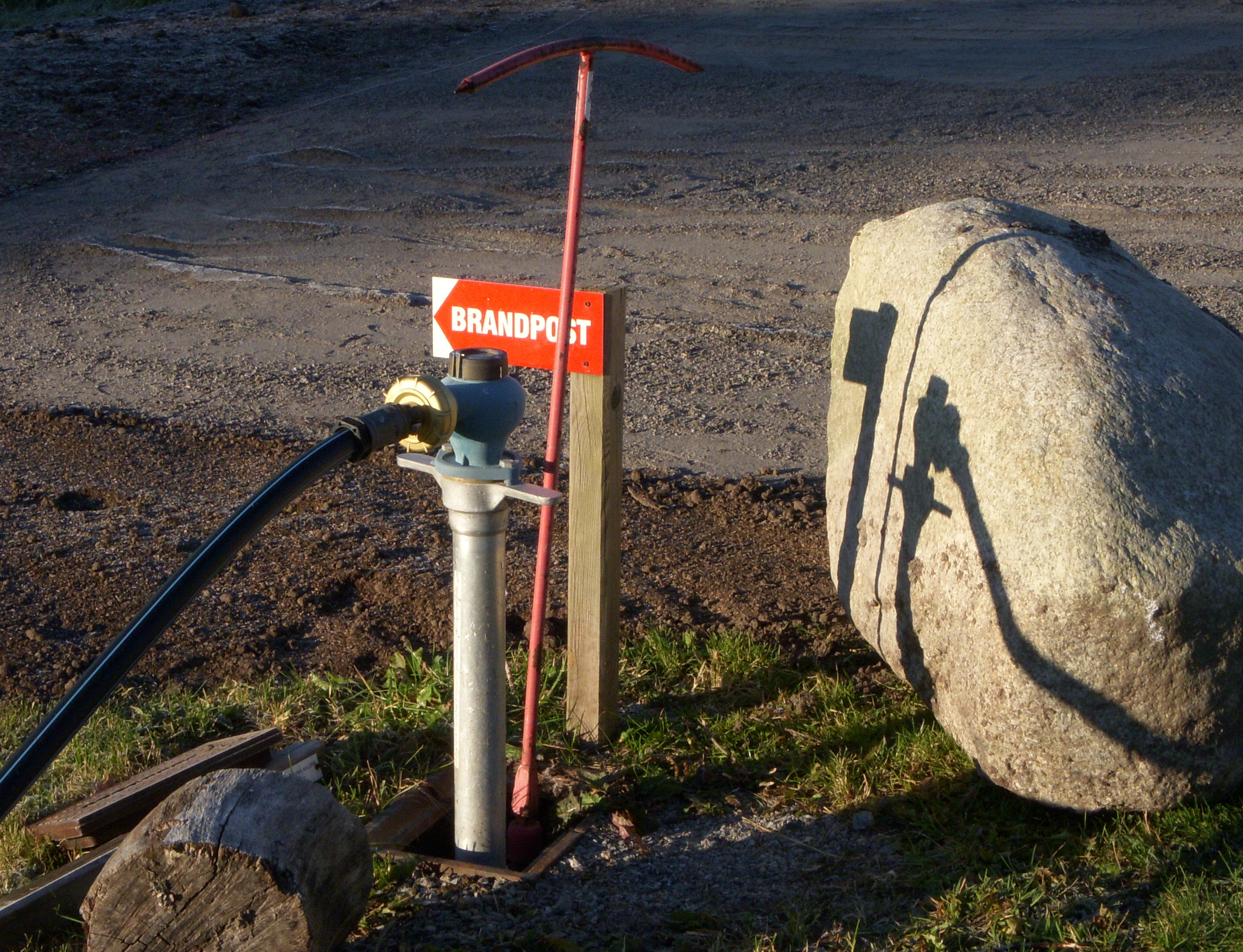 En brandpost i Huddinge, Sweden